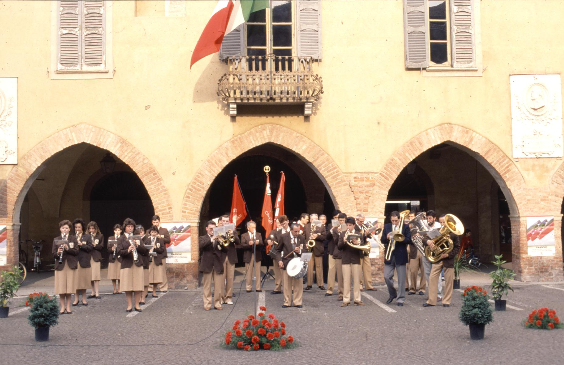 L'edificio comunale e la piazza centrale della città di Caravaggio, in Lombardia, in occasione dei festeggiamenti per il primo maggio 1987. The town hall and square in Caravaggio, Lombardy, during the 1987 Labour Day celebrations.